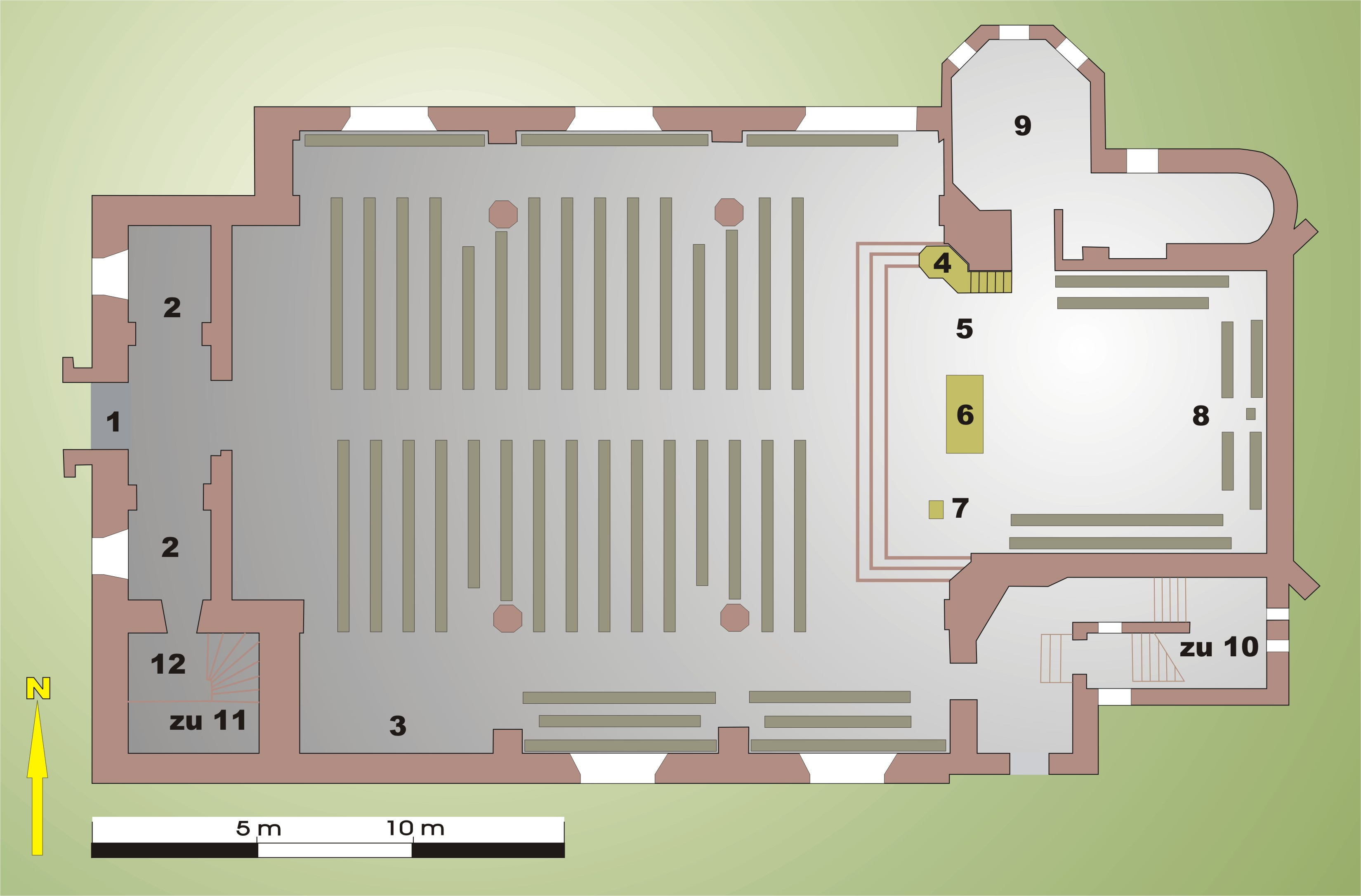 Grundriss der Christuskirche in Kassel - Deutschland - Hessen